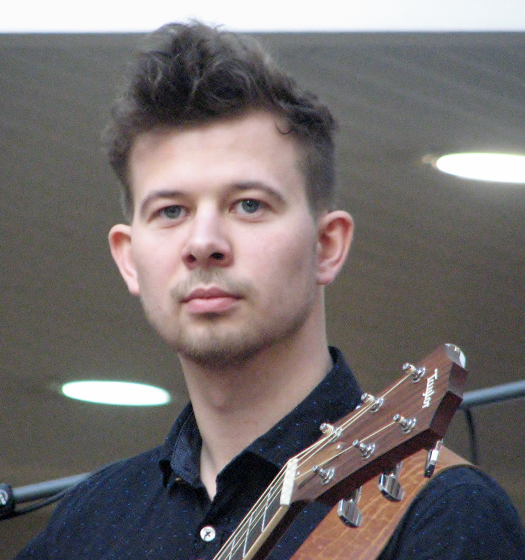 Jalmar Vabarna esinemas ansambli Curly Strings koosseisus Tallinn Music Weekil